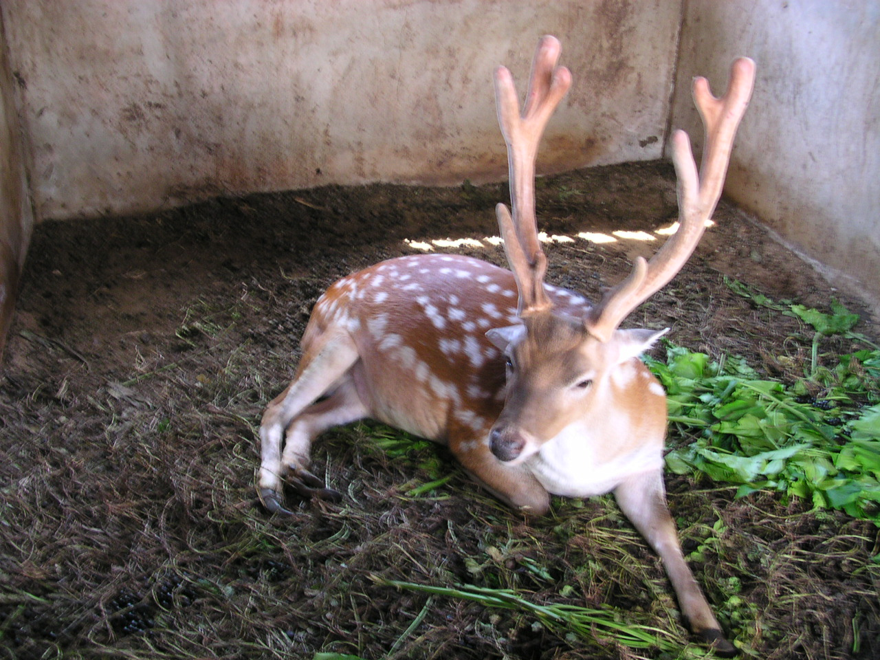 綠島民眾馴養的梅花鹿。Bân-lâm-gú: Li̍k-tó bîn-tsiòng sûn-ióng ê muî-hue-lo̍k.